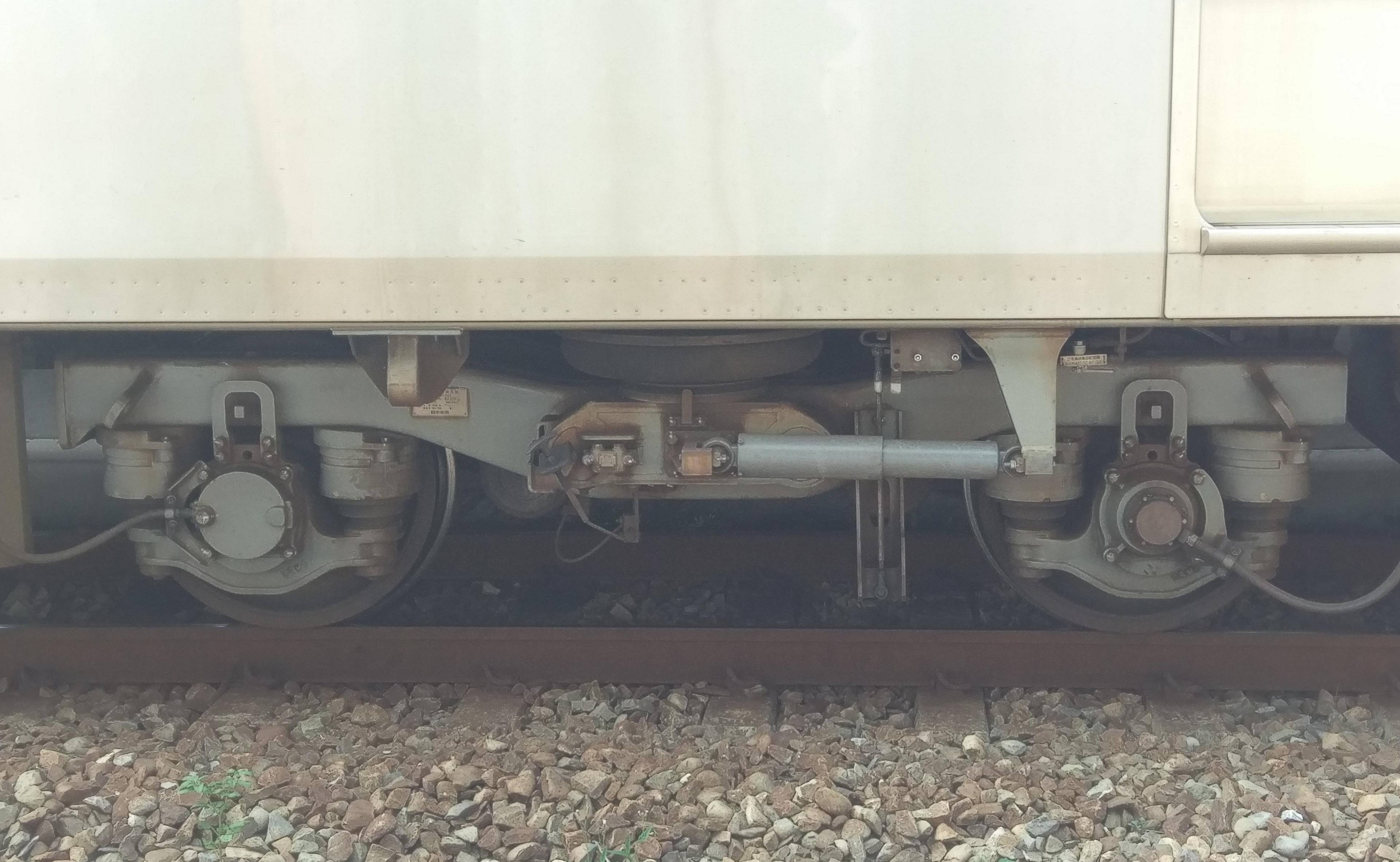 中文（台灣）: 台鐵EMU800型電聯車的轉向架